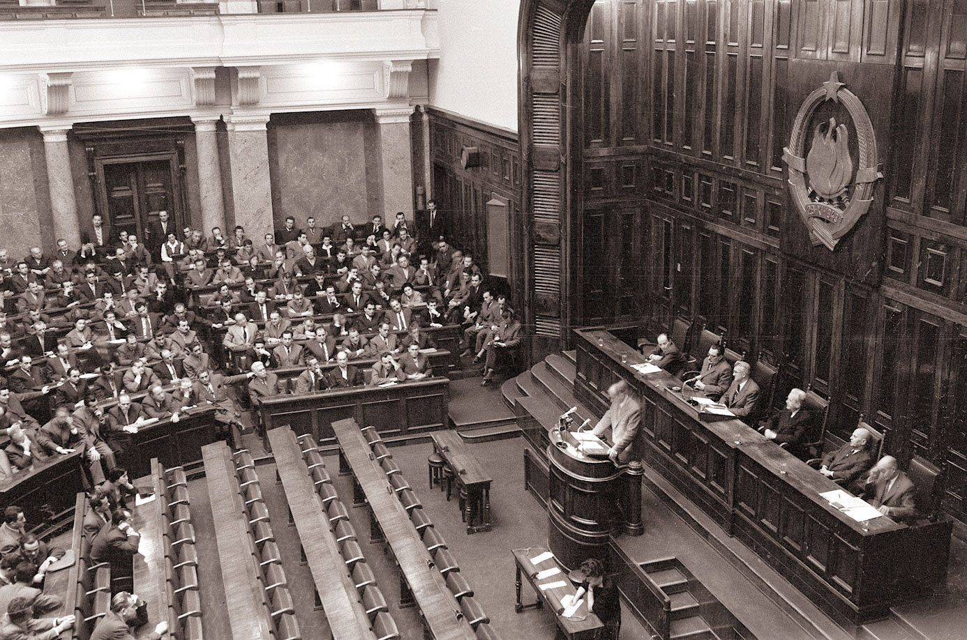 Zvezna ljudska skupščina v Beogradu